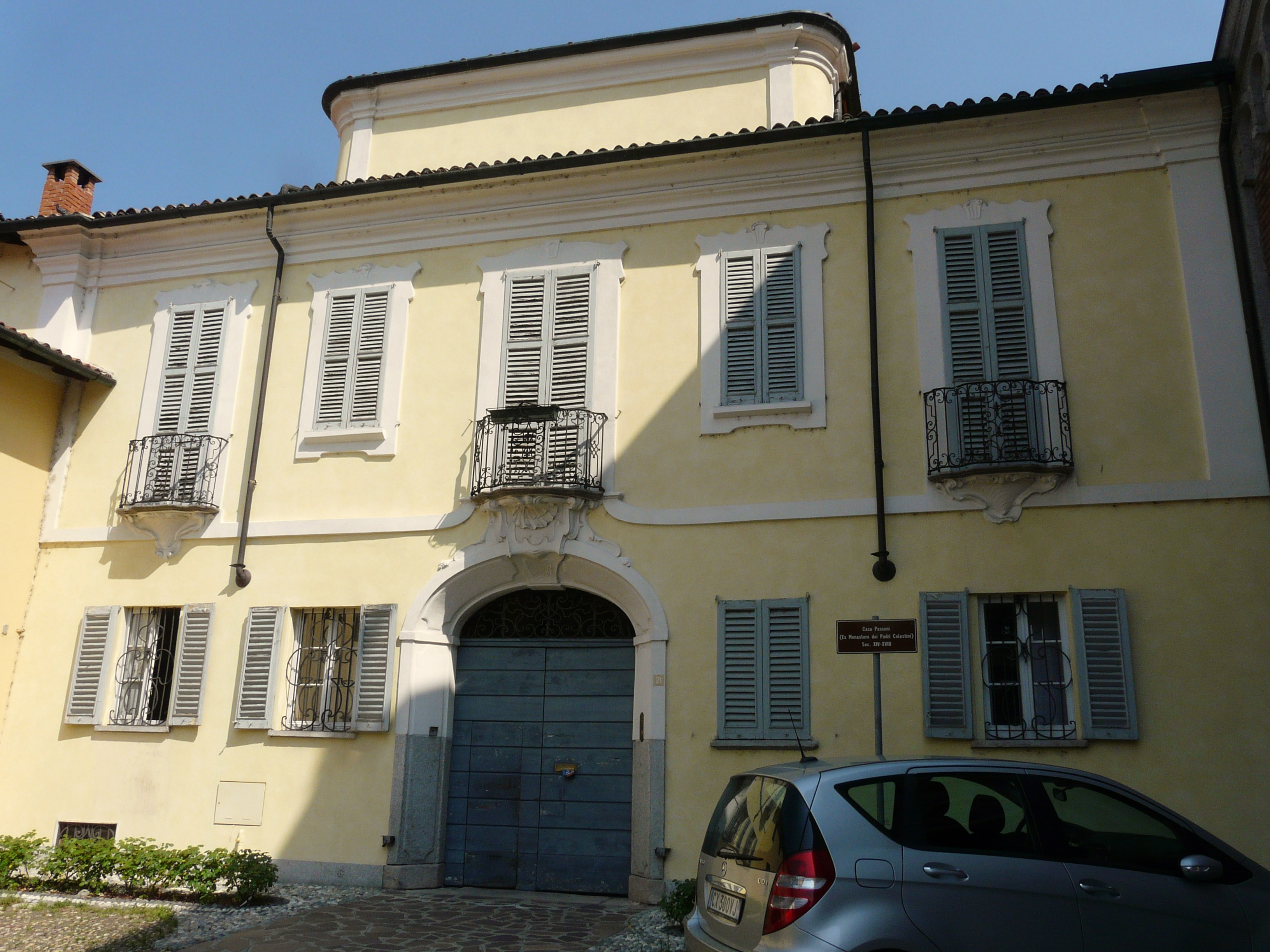 Casa Passoni (ex monastero dei Padri Celestini), Magenta, Lombardia, Italia